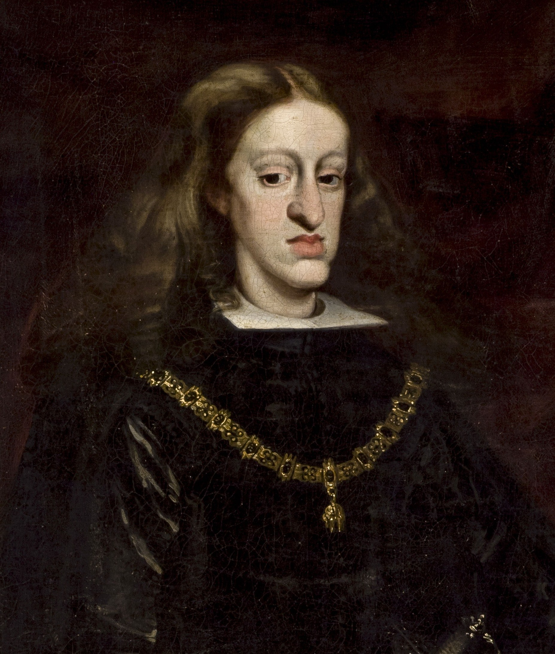 Carlos II of Spain (1661-1700).